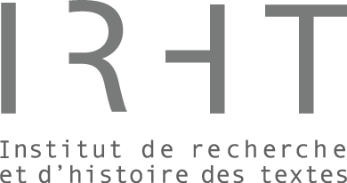 Logo officiel de l'IRHT